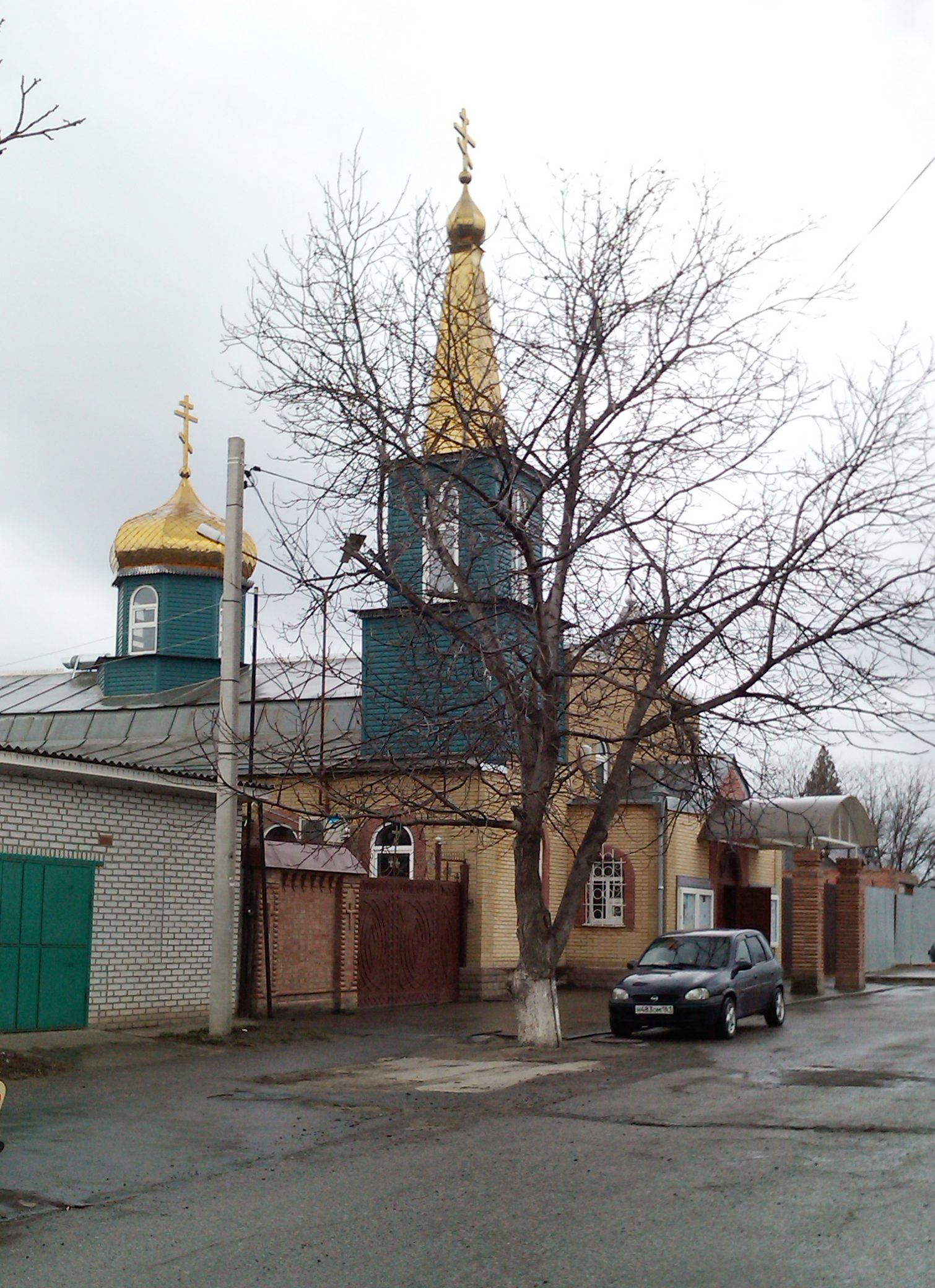 Свято-Георгиевский храм, Таганрог, 2014